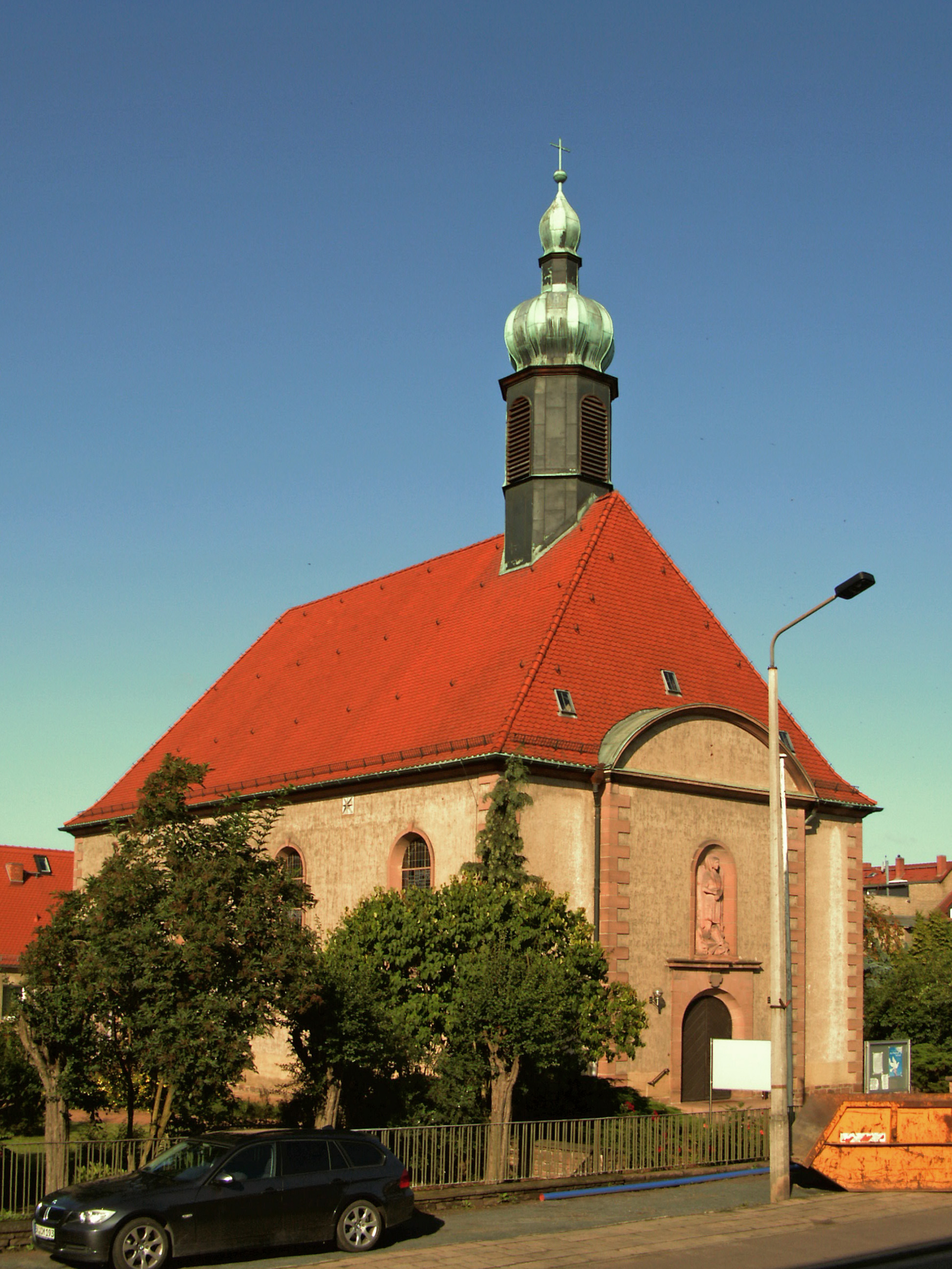 Katholische Kirche St. Liborius in Haldensleben